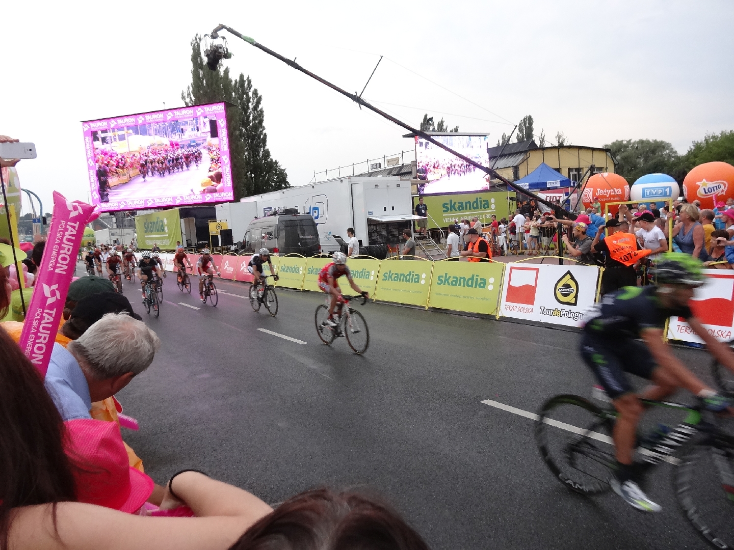 Tour de Pologne 2014 - meta I etapu w Bydgoszczy